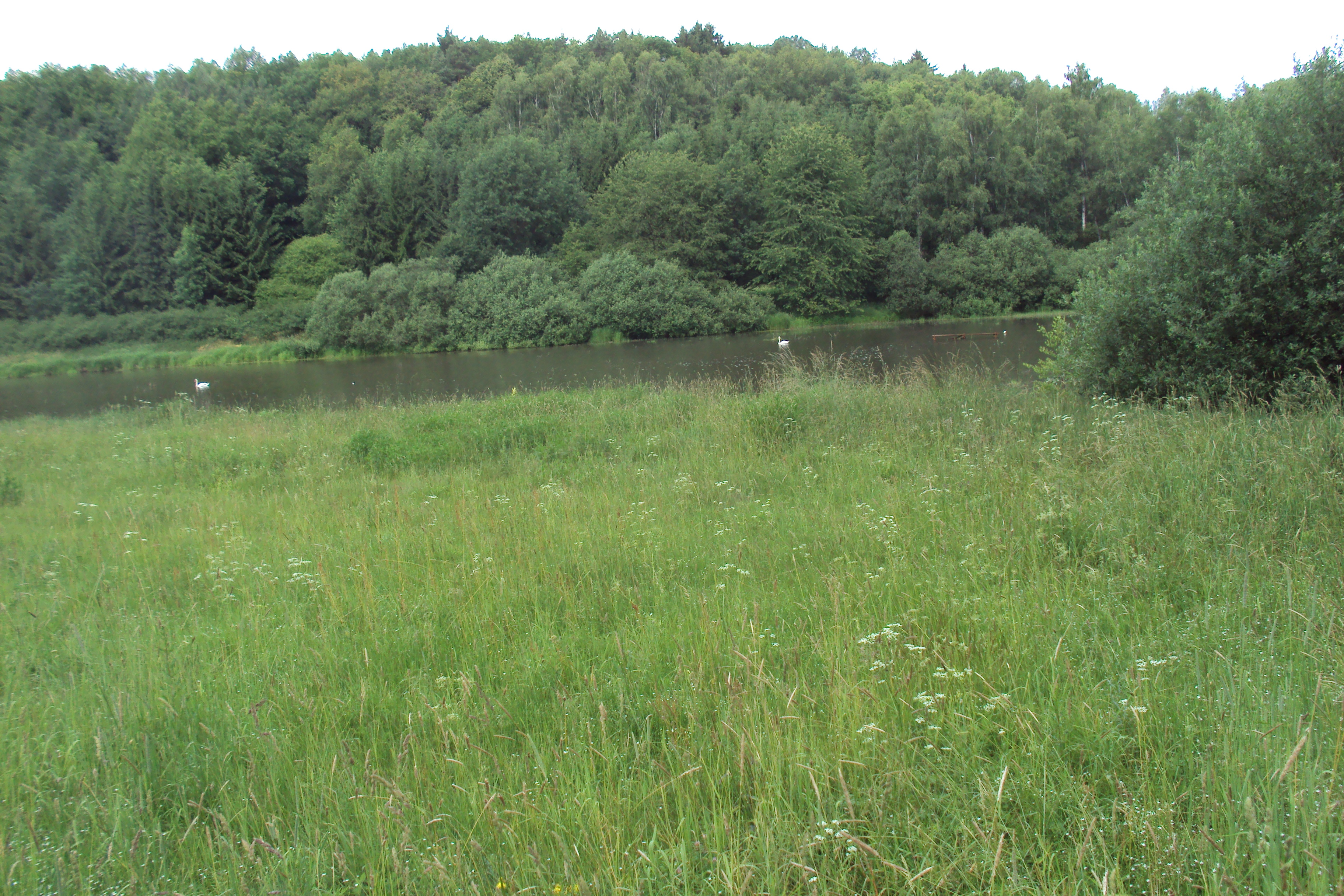 Ptačí rybník v Horní Libchavě